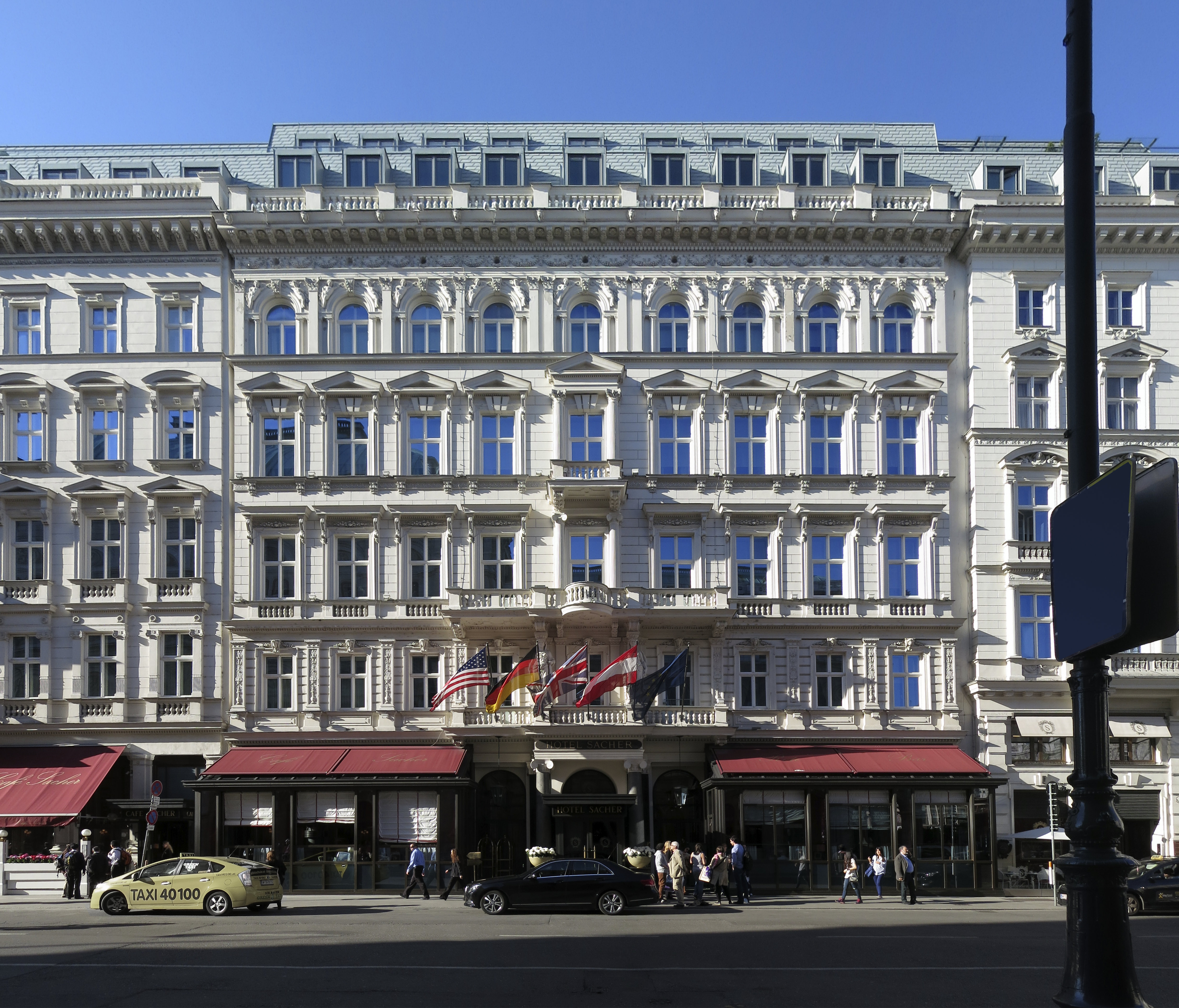 Cafe Sacher Wien